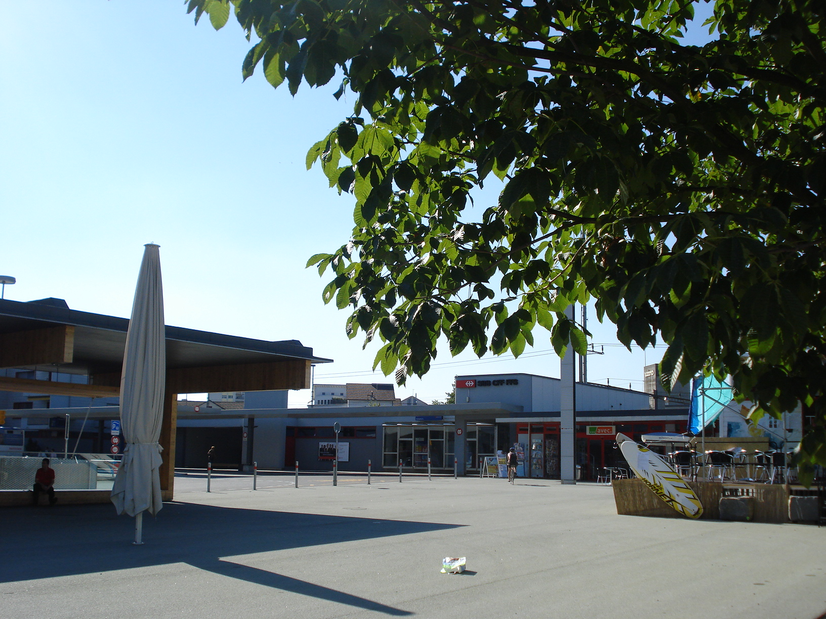 Bahnhof Rotkreuz